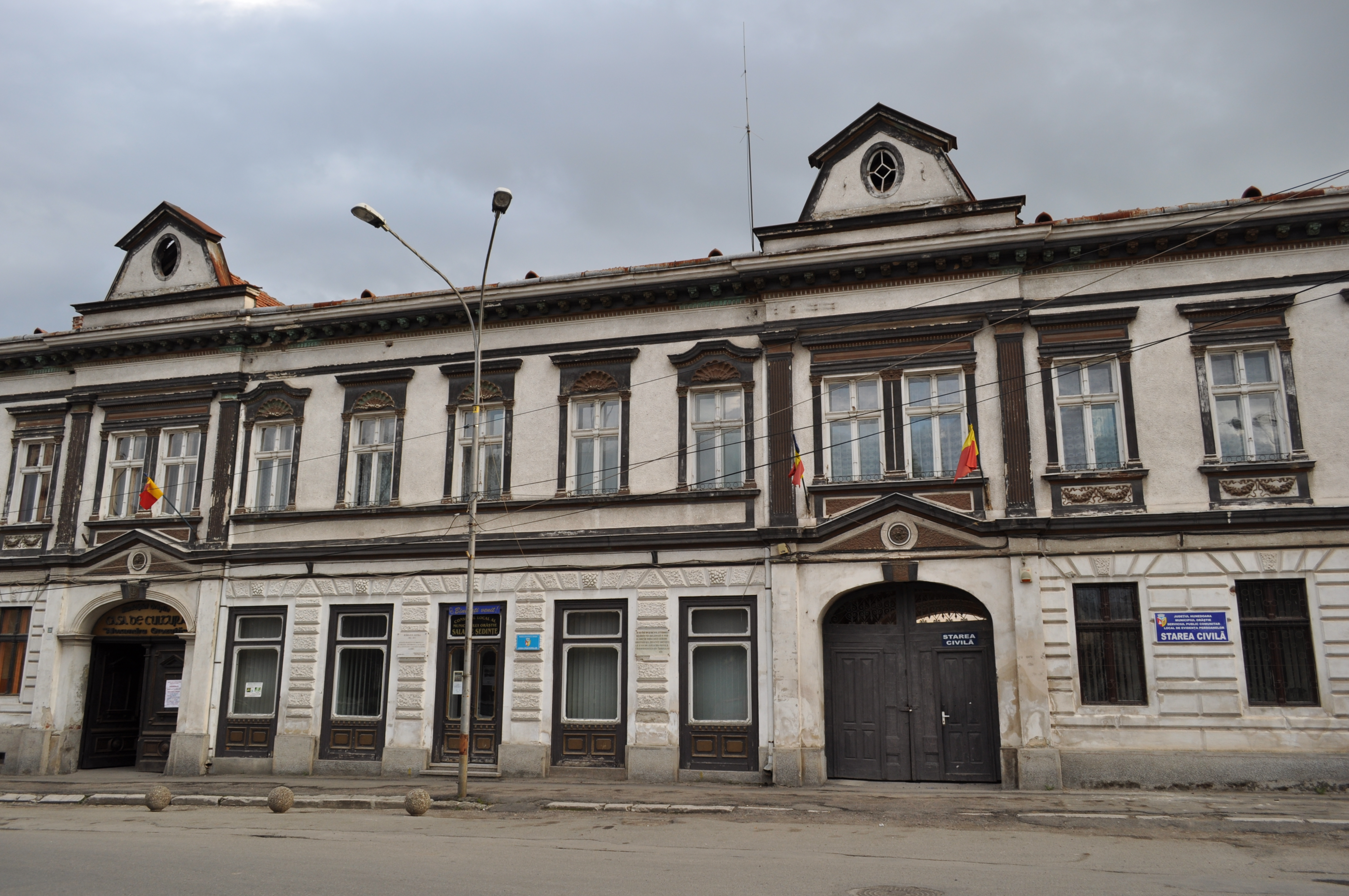 Ansamblul urban "Piaţa Victoriei" (detaliu) 07